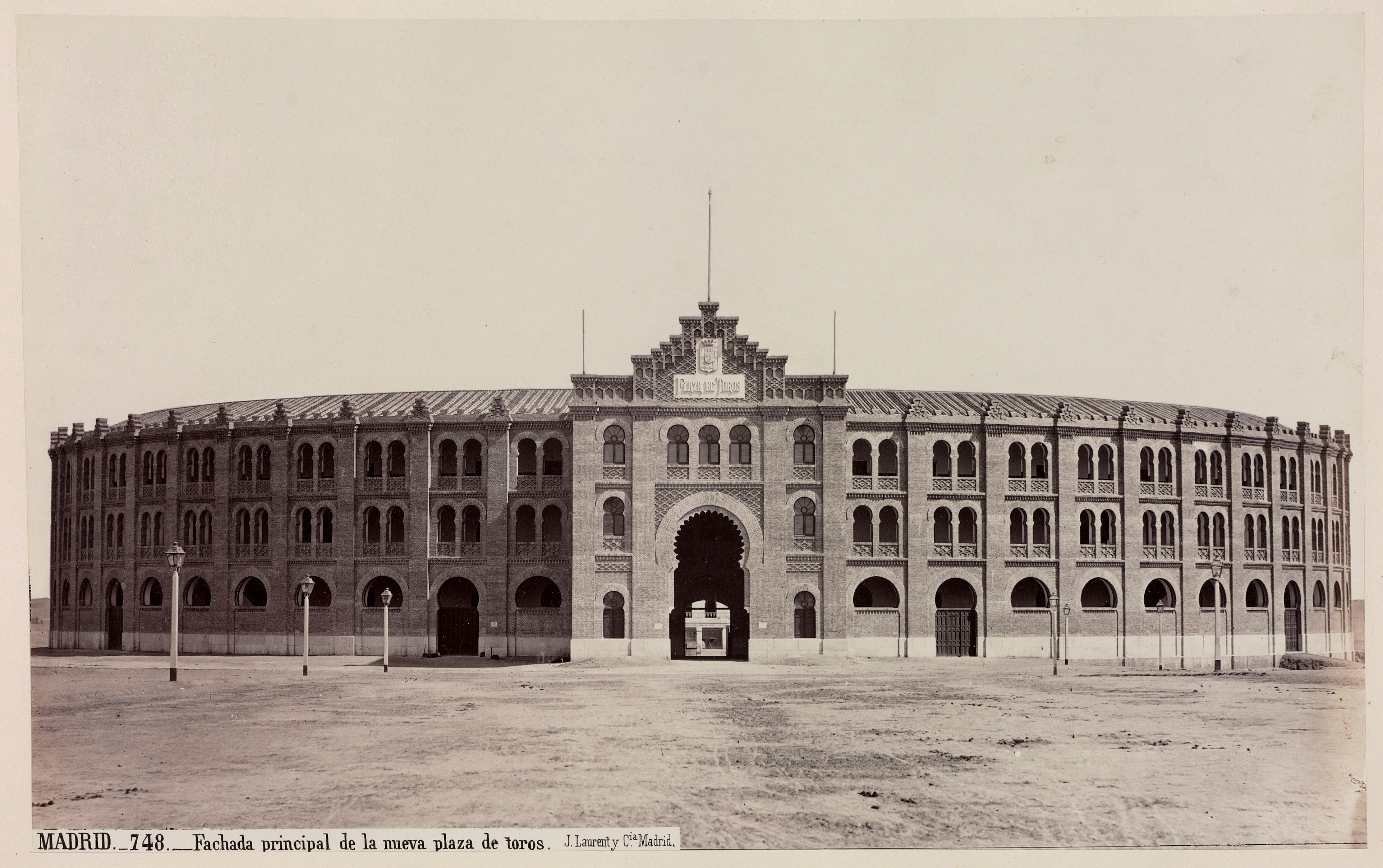 Juan Laurent, J. (1816-1886), Fachada principal de la nueva plaza de toros, 1874. Fotografía en papel albúmina; 214 x 341 mm. Leyenda en la esquina inferior izquierda: "MADRID.-748.- Fachada principal de la nueva plaza de toros. J. Laurent. y Cia. Madrid", BNE